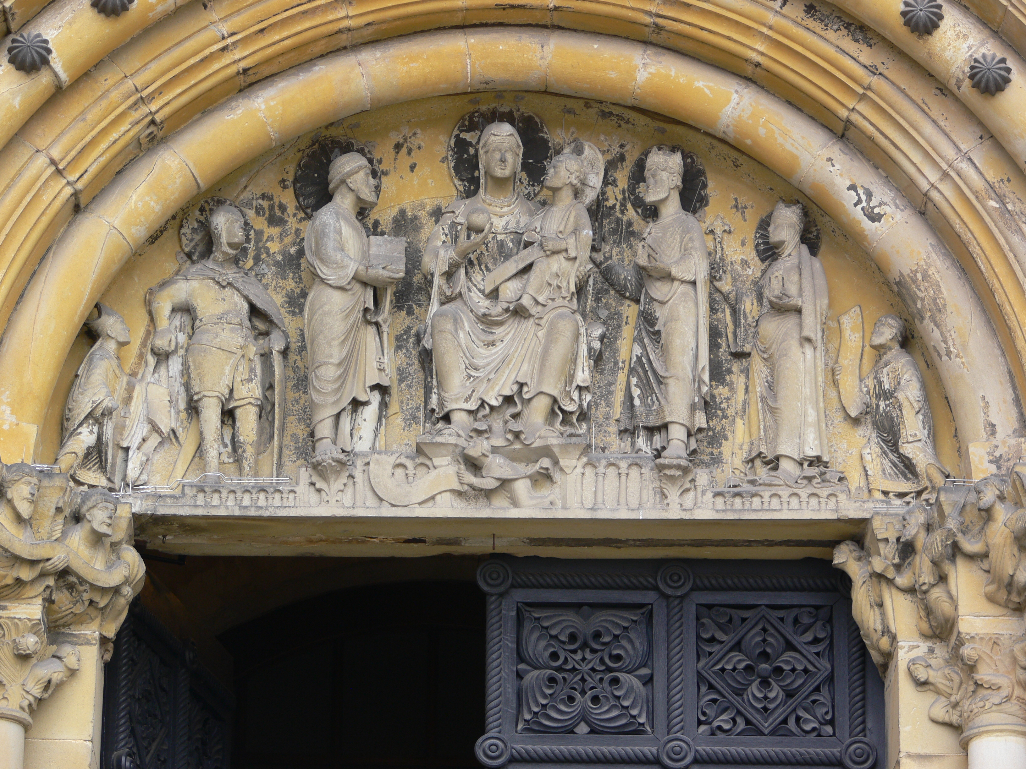 Bamberg, Dom St. Peter und St. Georg Marienpforte, Tympanon